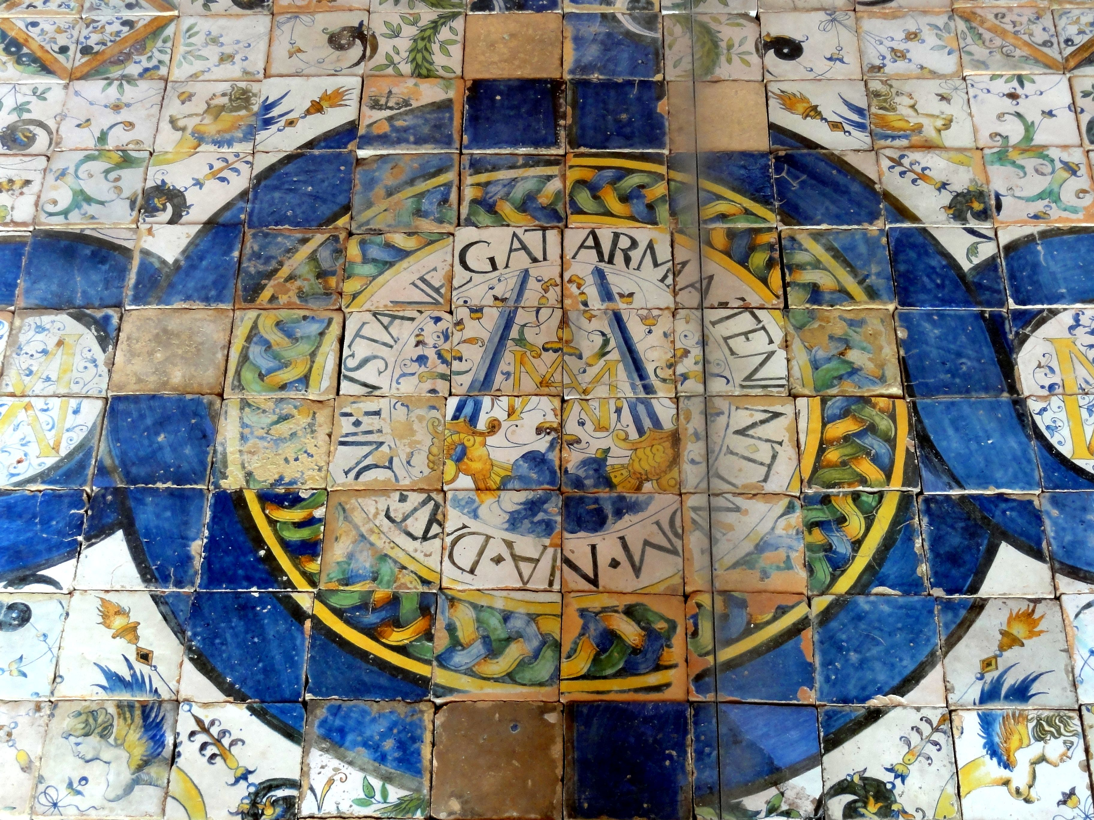 Carreaux de pavement du château, commandé par Anne de Montmorency à l'artiste rouennais Masséot Abaquesne pour les appartements royaux vers 1549-1551.